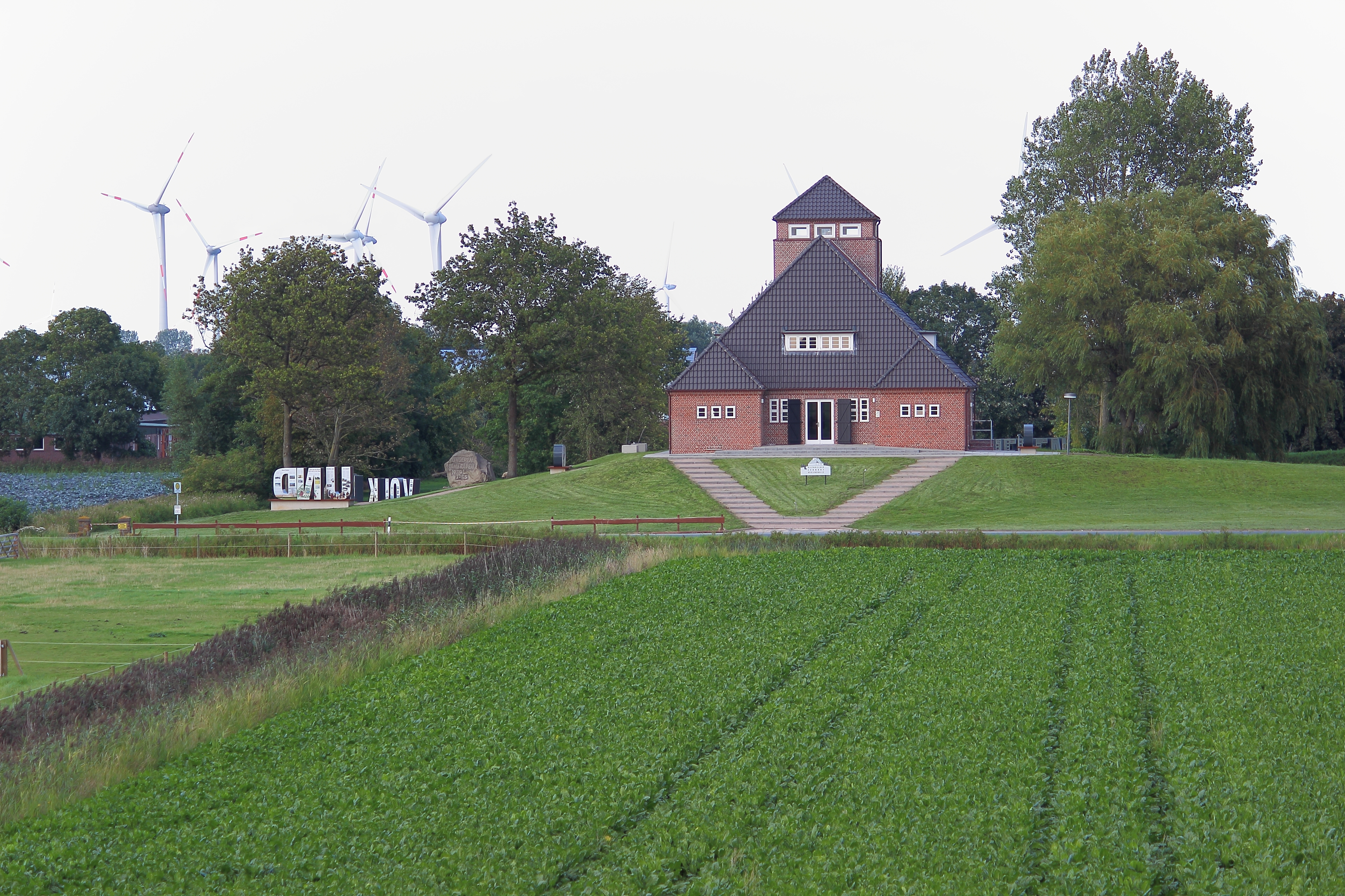 Neulandhalle Dieksanderkoog, 20. August 2019